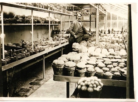 Foto von Heinrich Möller